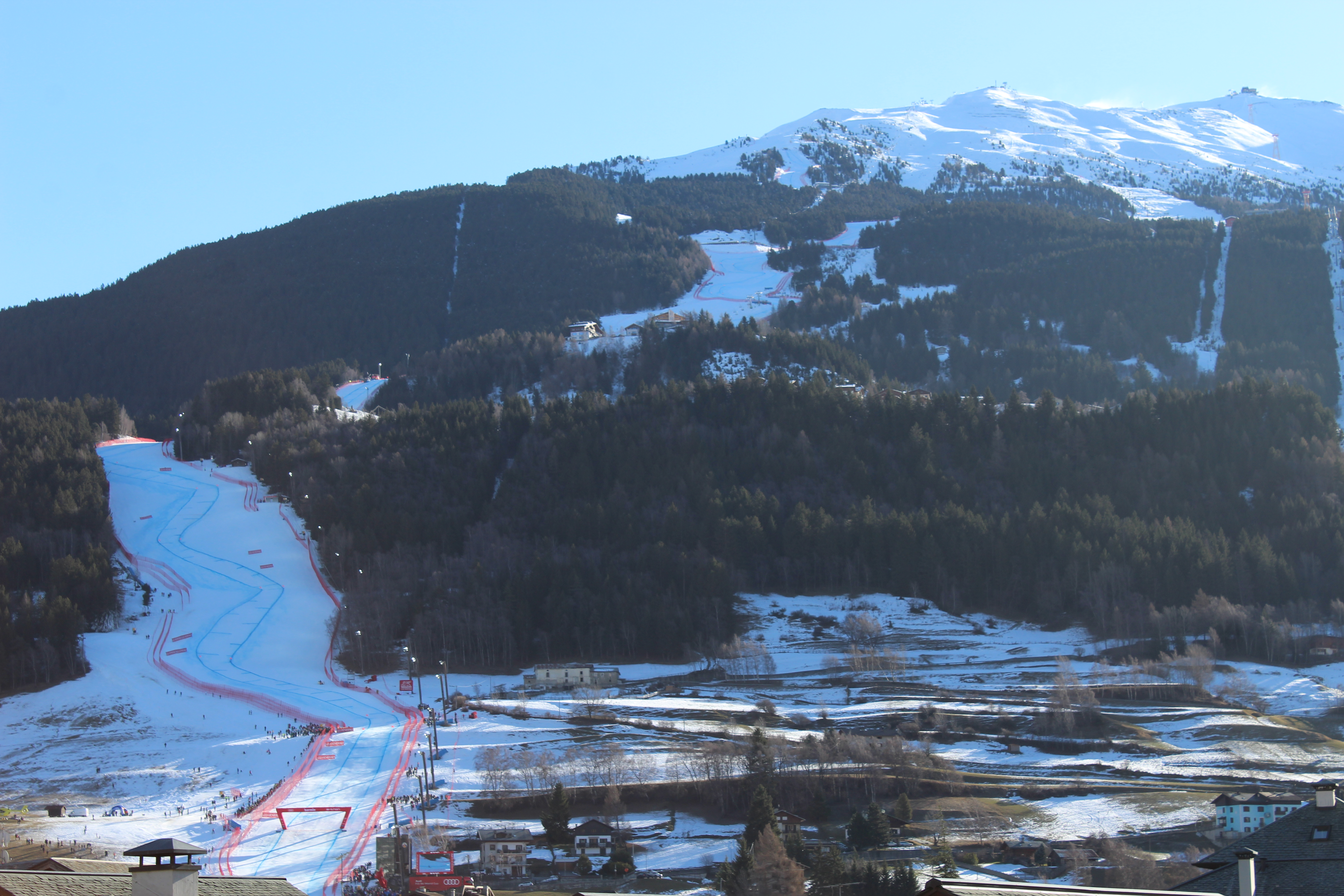 La Pista Stelvio di Bormio, durante la discesa libera del 28 dicembre 2019, valida per la Coppa del Mondo di sci 2019-2020.